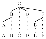 Schematischer Abhängigkeitsbaum